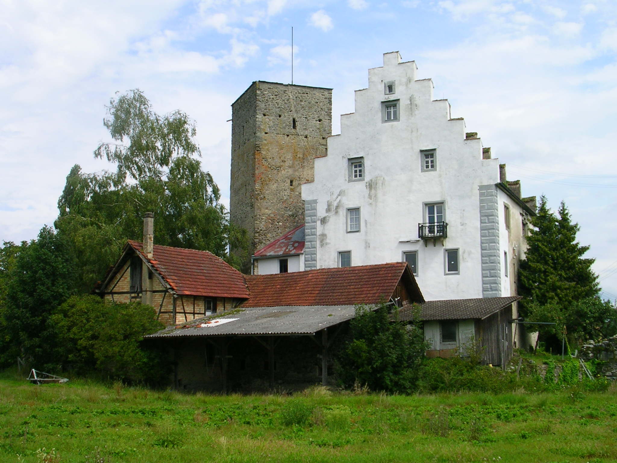 Burg Giessen in Betznau bei Kressbronn, Lake Constanze